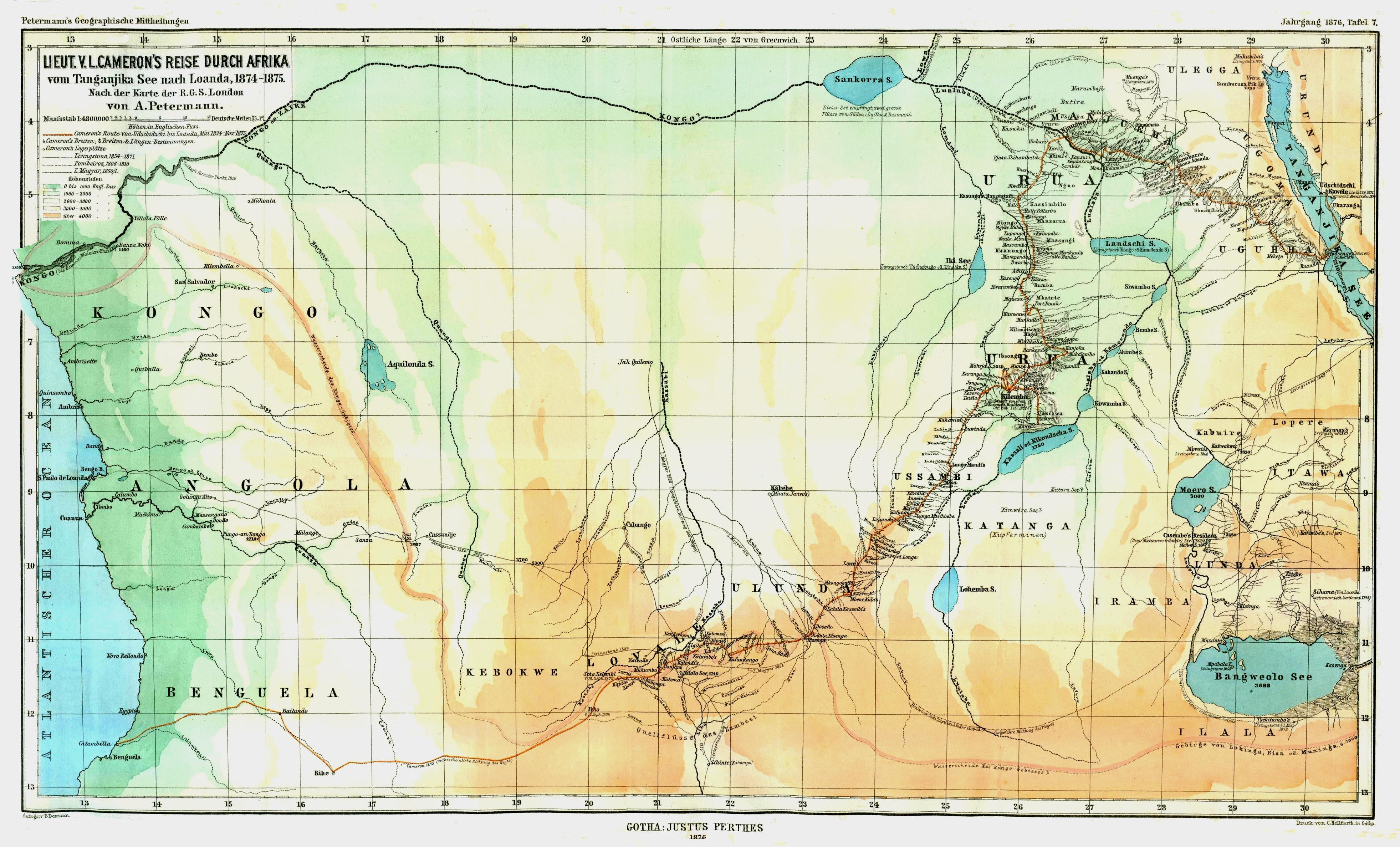 Cameron's Reise durch Afrika vom Tanganjika-See nach Benguela, 1874-1875